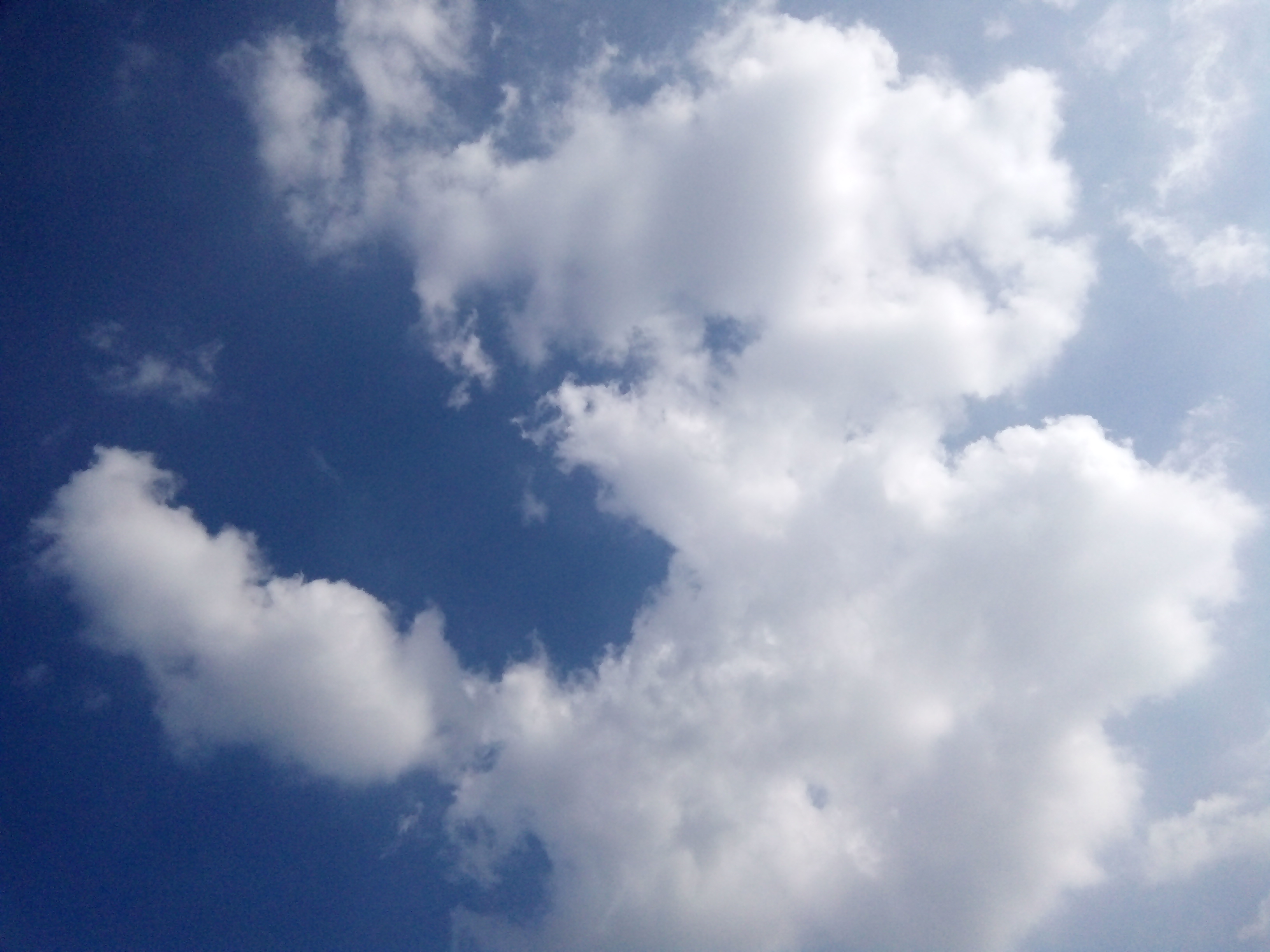 হেমন্তের দুপুরে আকাশের মেঘ